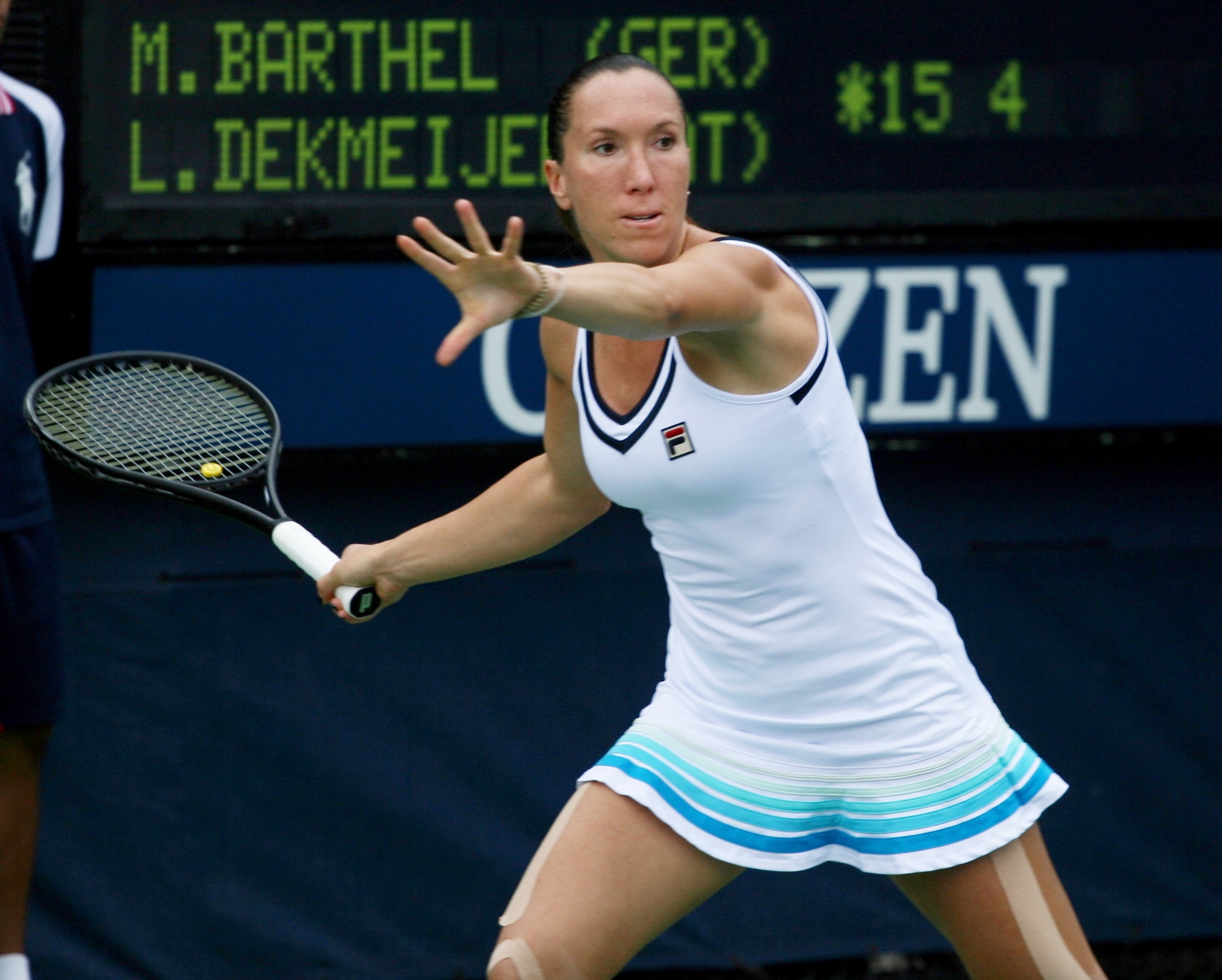 U.S. Open Saturday, Aug. 31, 2013